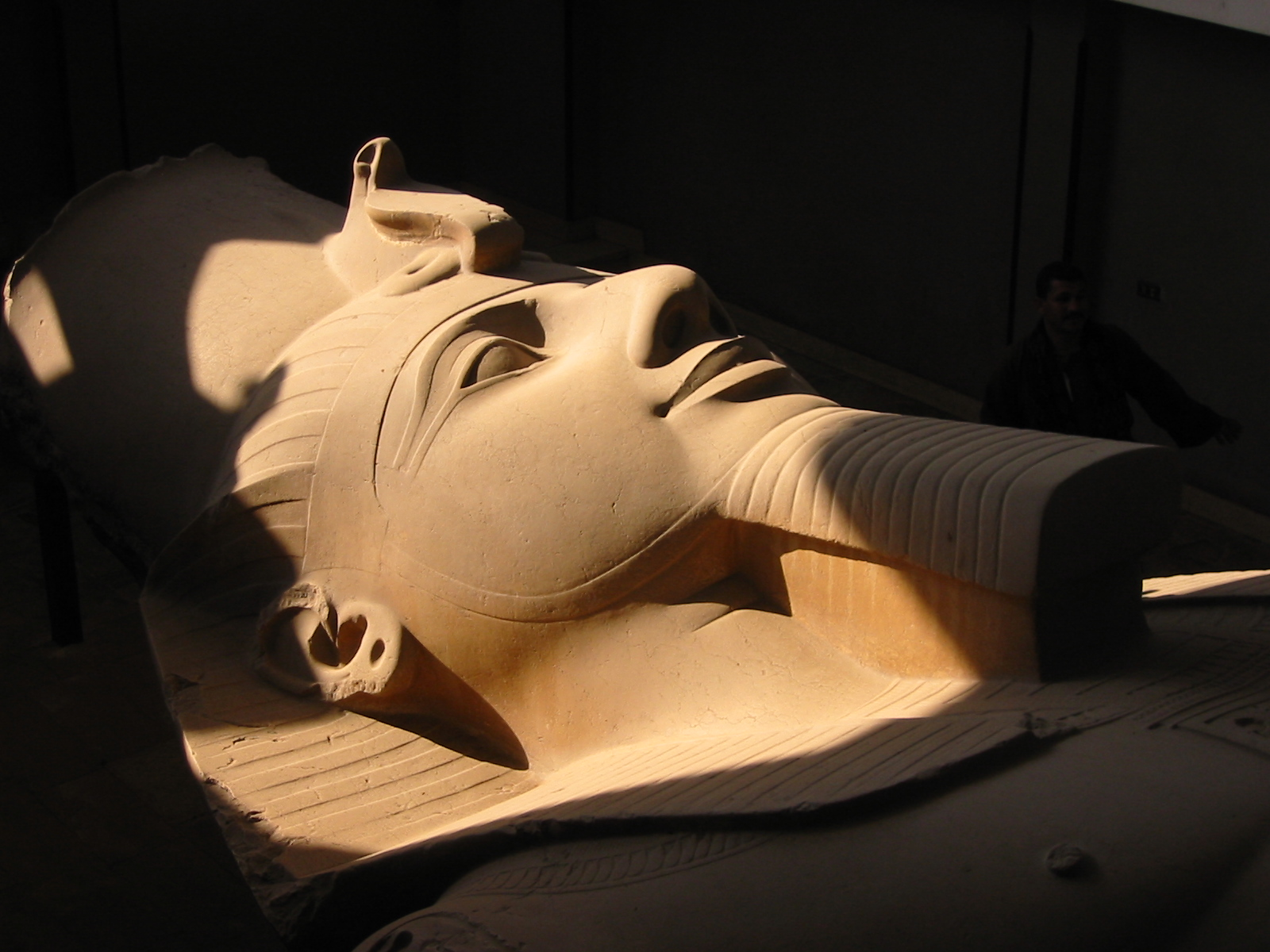 Kolosstatue Ramses II. in Memphis